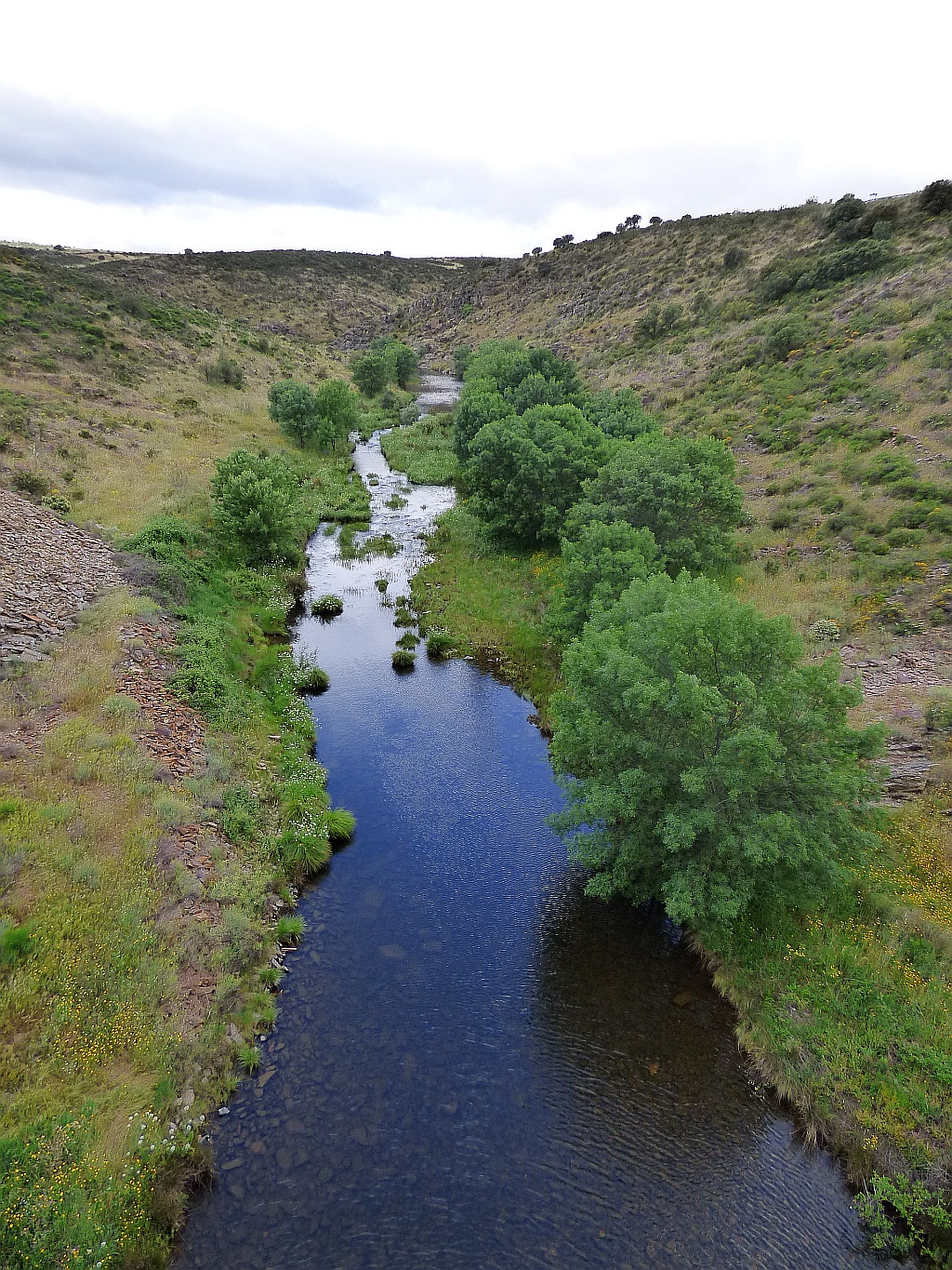 río Huso